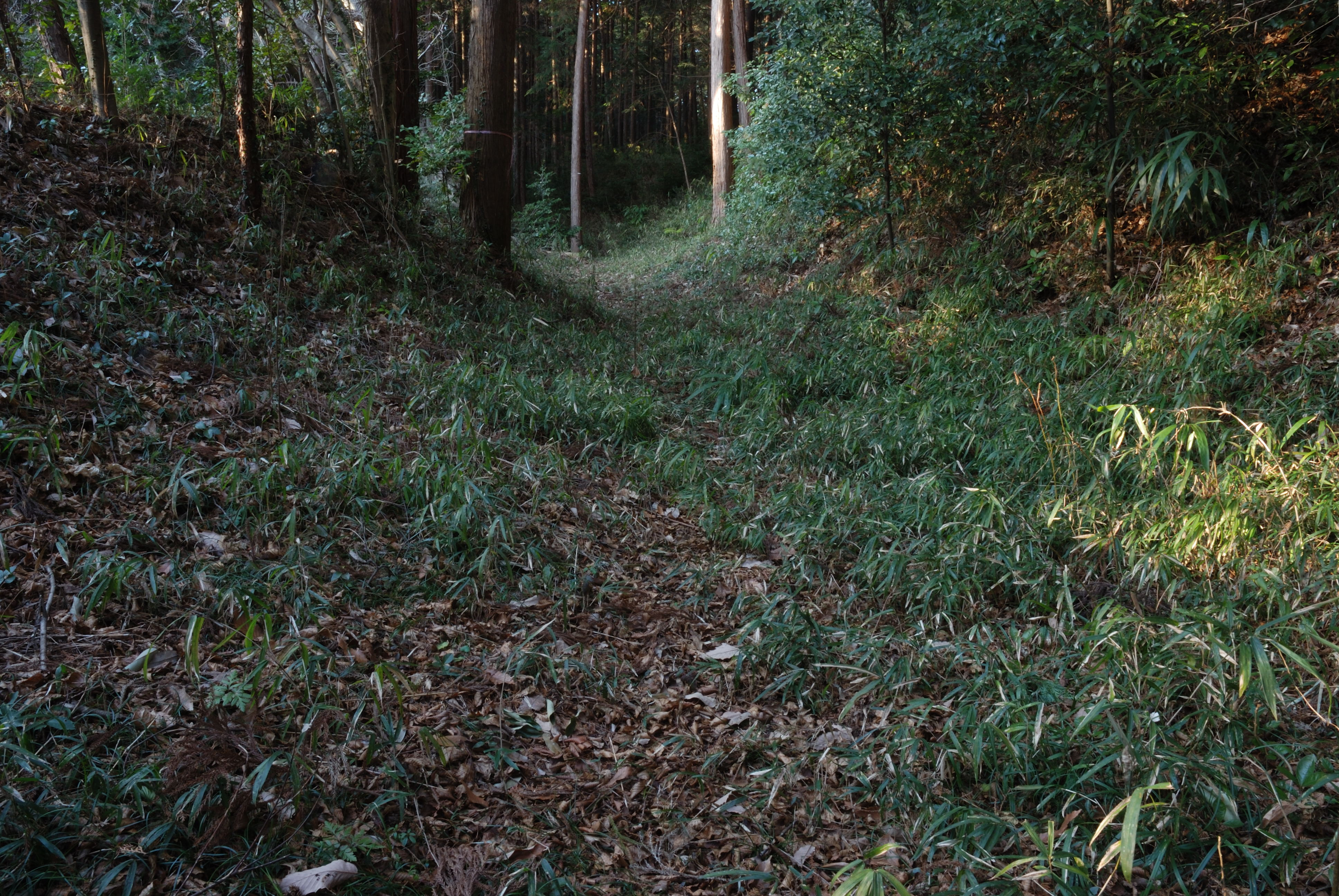 Katsunuma castle karabori